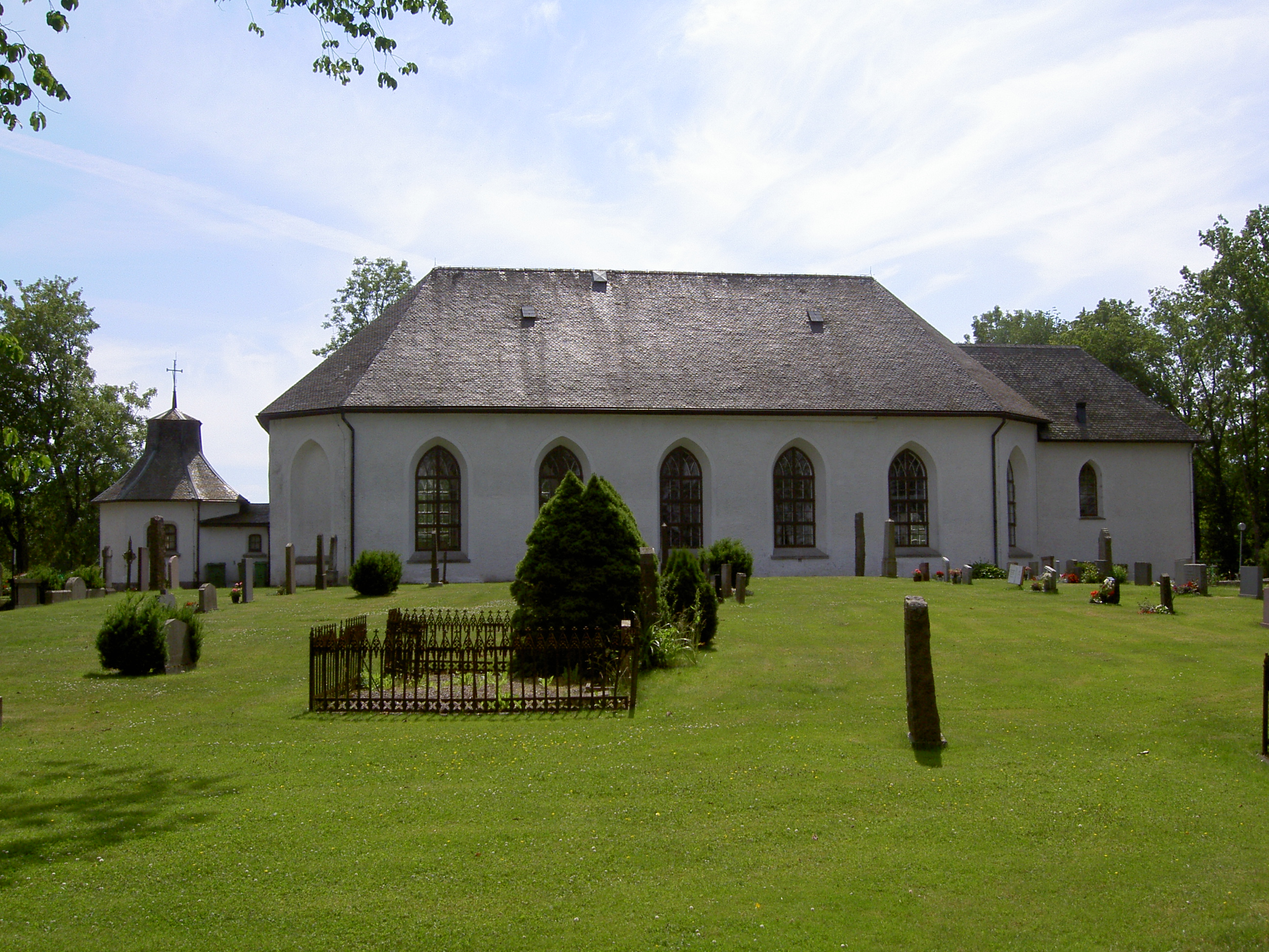 Brålanda kyrka